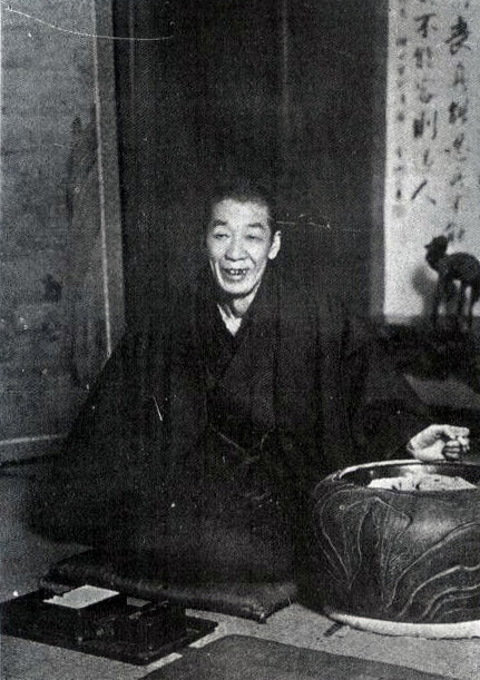 立憲政友会最高顧問榊田清兵衛.